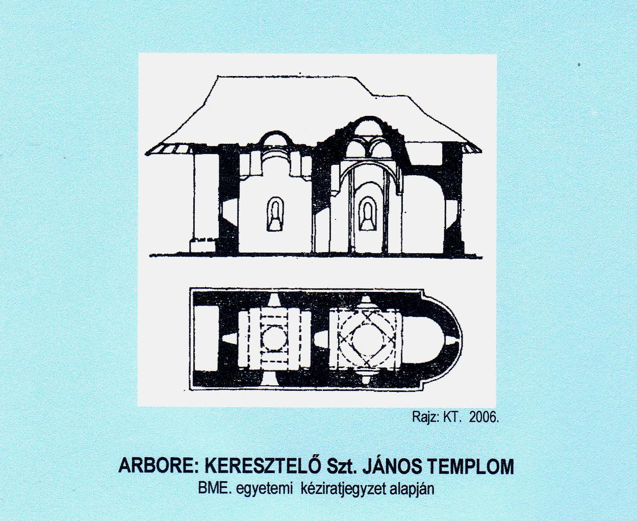 Arbore kolostortemplomának alaprajza (Románia)